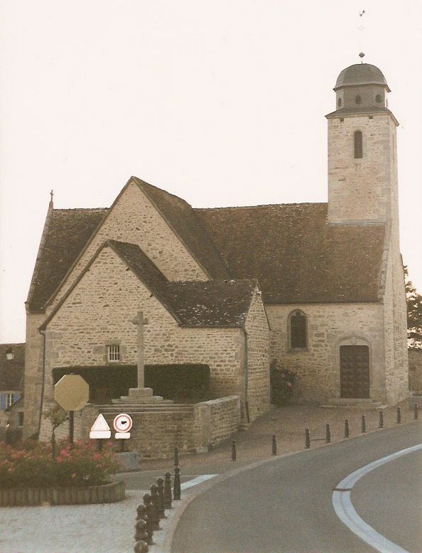 L'église Saint Martin de Condé-sur-Sarthe